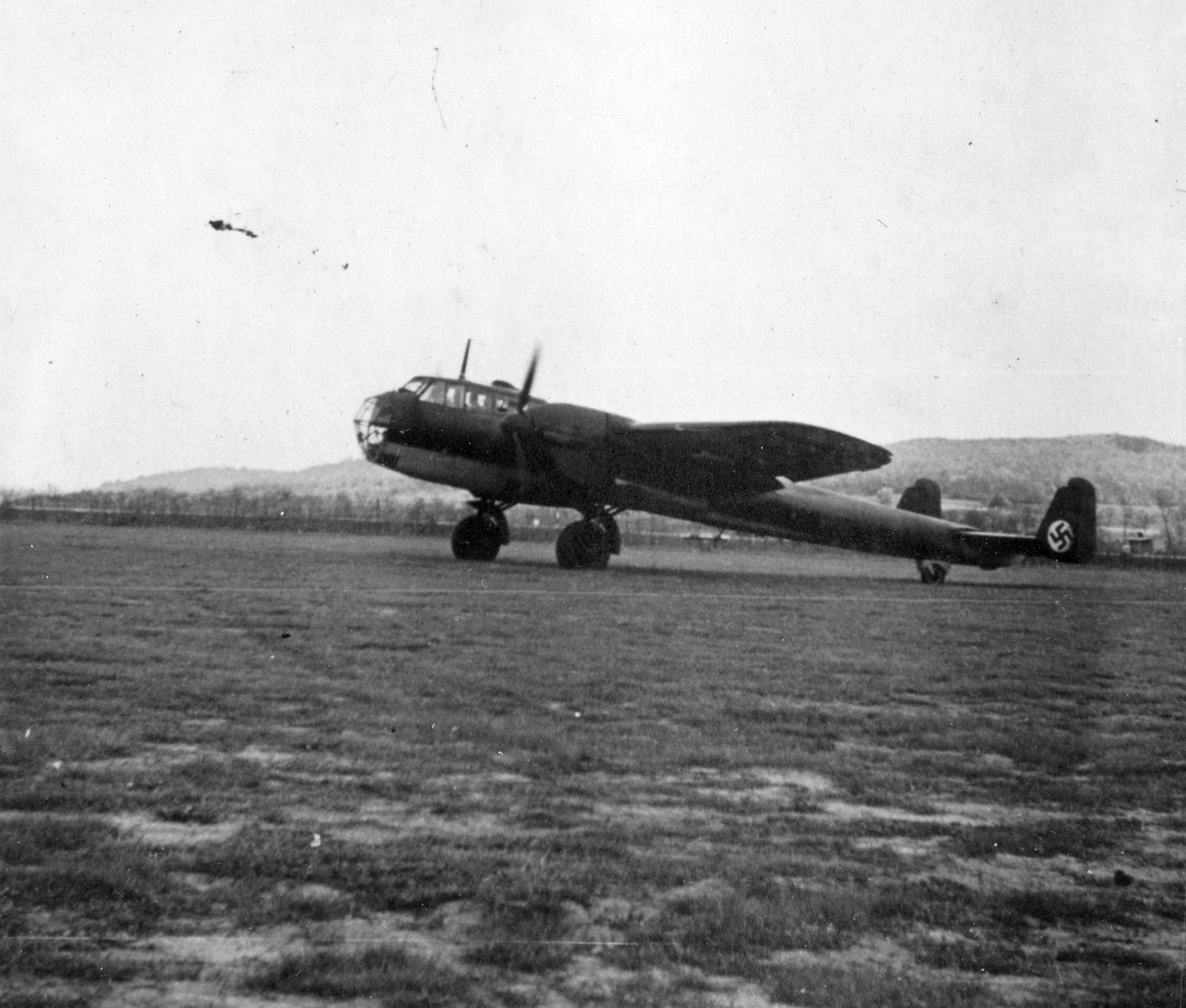 Dornier Do-215 típusú felderítő és könnyűbombázó repülőgép. Location: Hungary, Budapest XI., Budaörs Airport Tags: Dornier-brand, Gerrman brand, airplane, Budapest Title: Dornier Do-215 típusú felderítő és könnyűbombázó repülőgép.